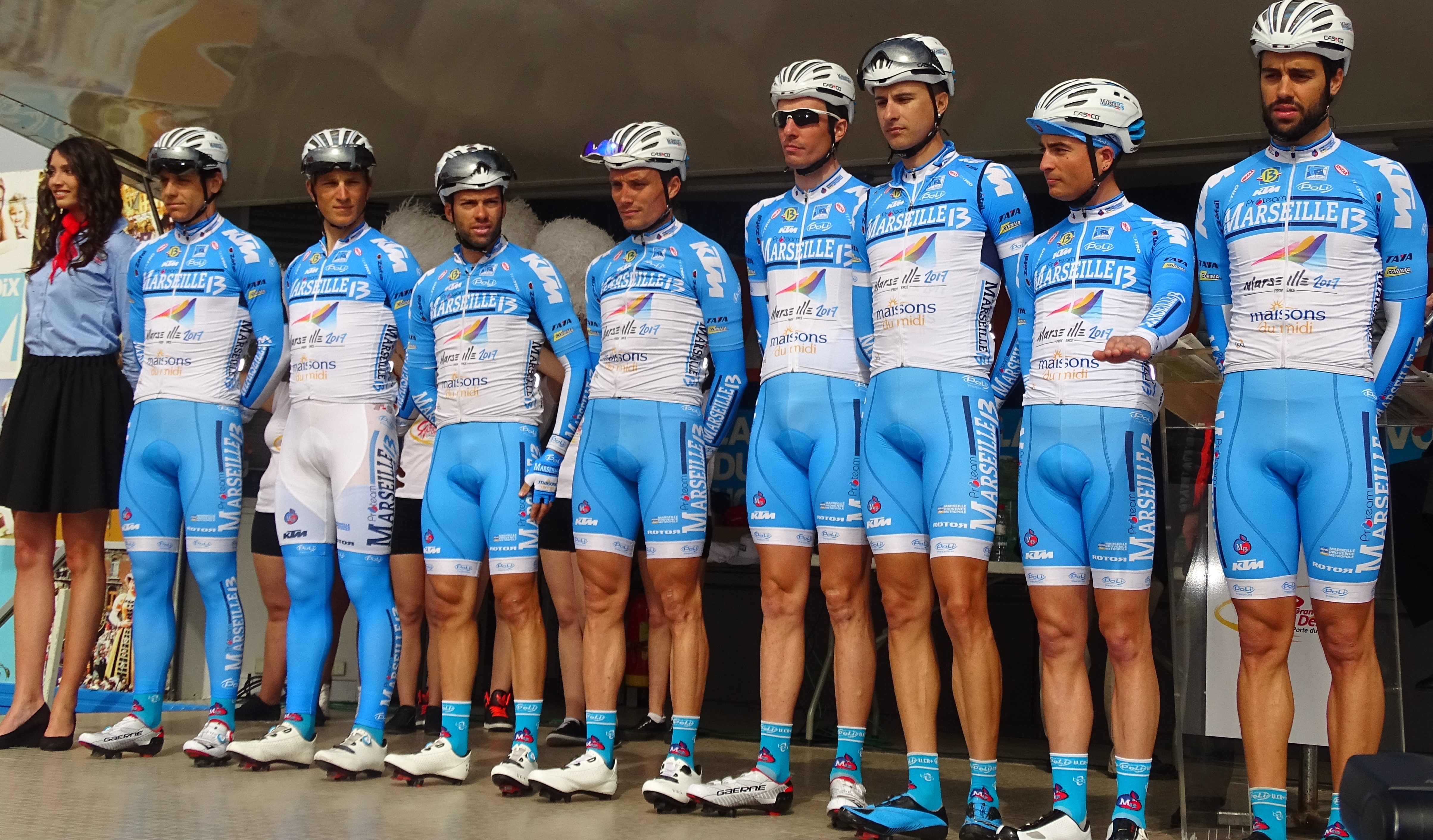 Reportage réalisé le jeudi 16 avril à l'occasion du départ et de l'arrivée du Grand Prix de Denain 2015 à Denain, Nord, Nord-Pas-de-Calais, France.